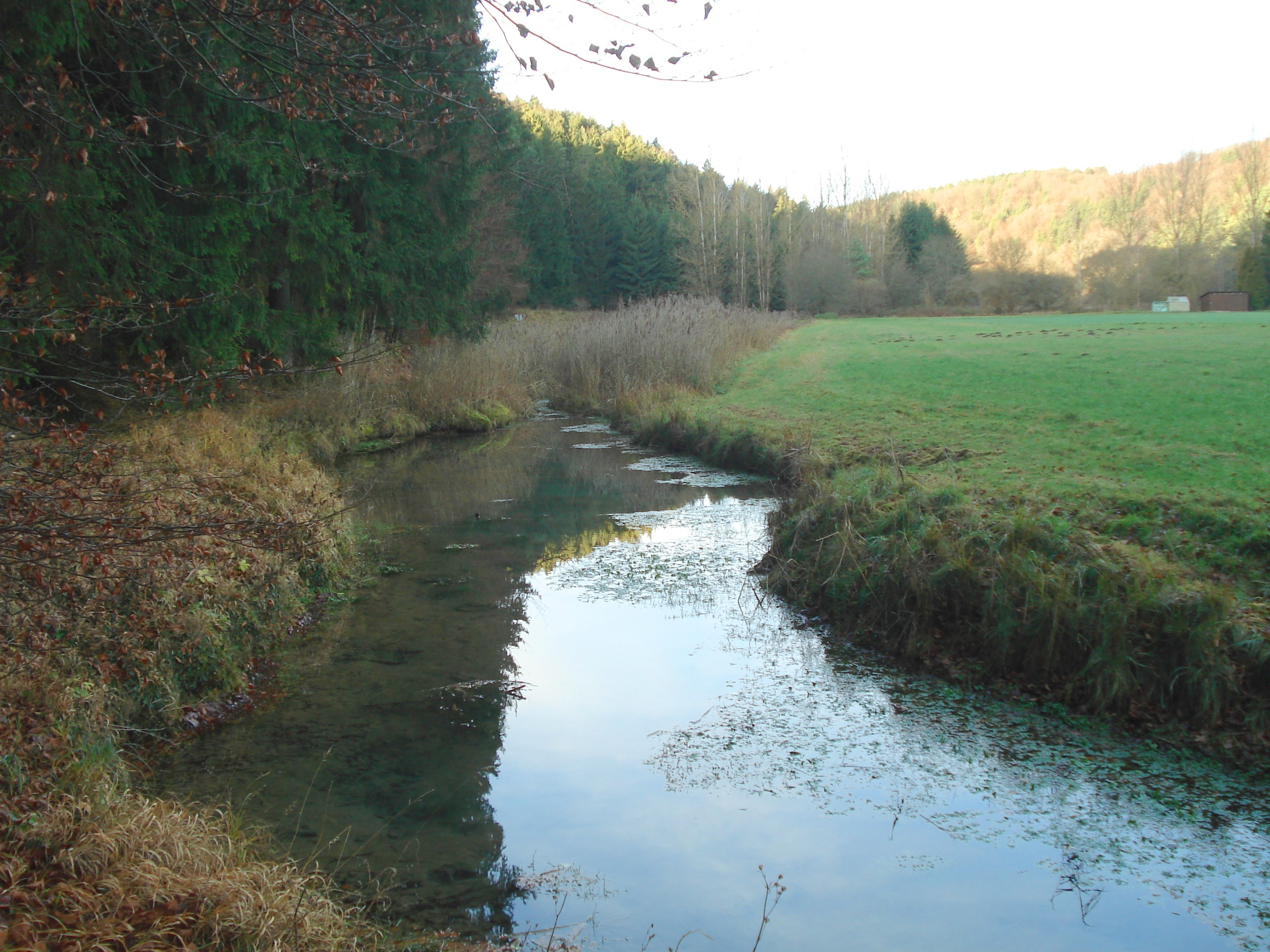 Die Bachmühlbachquelle